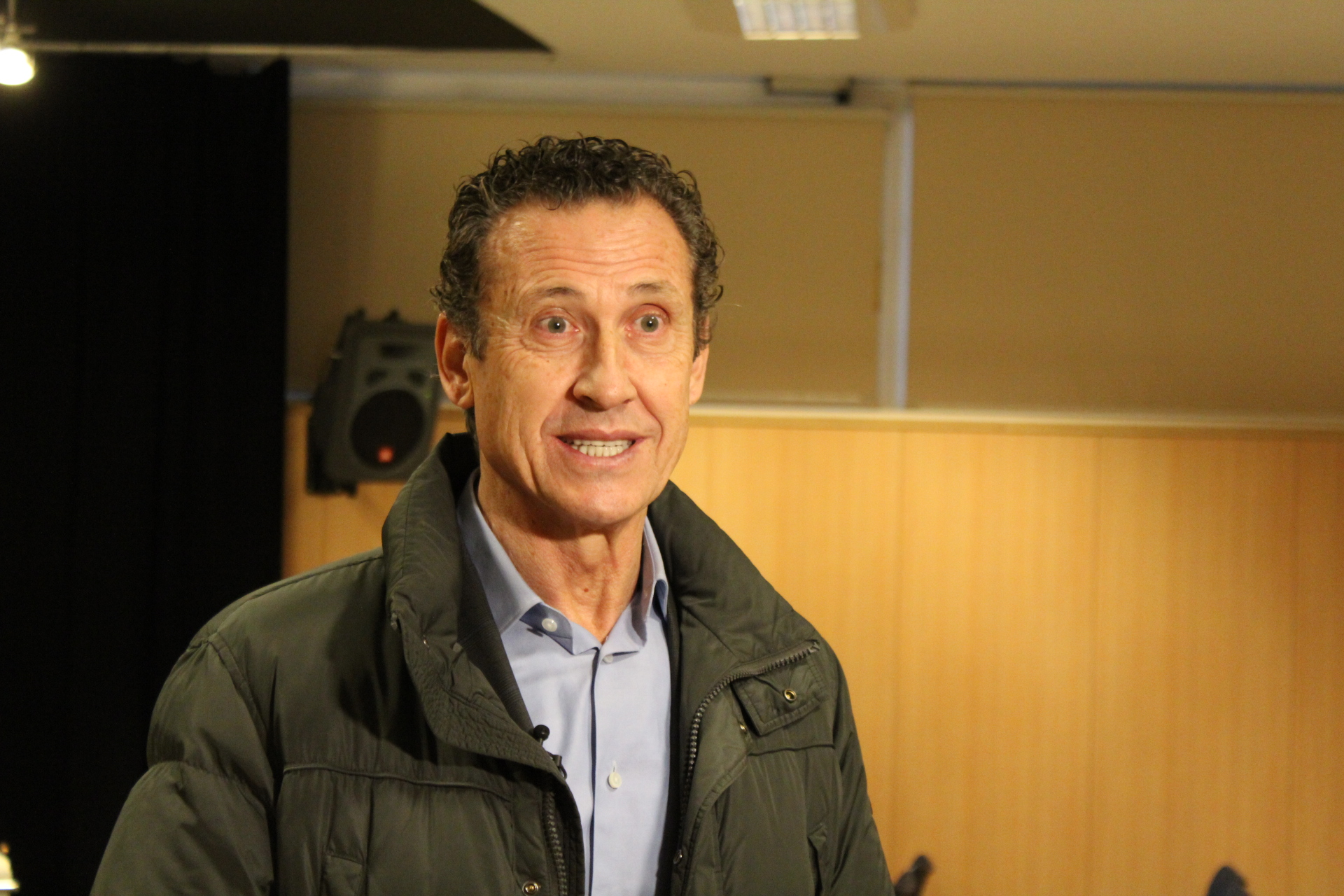 Jorge Valdano Ernest Lluch kultur etxean